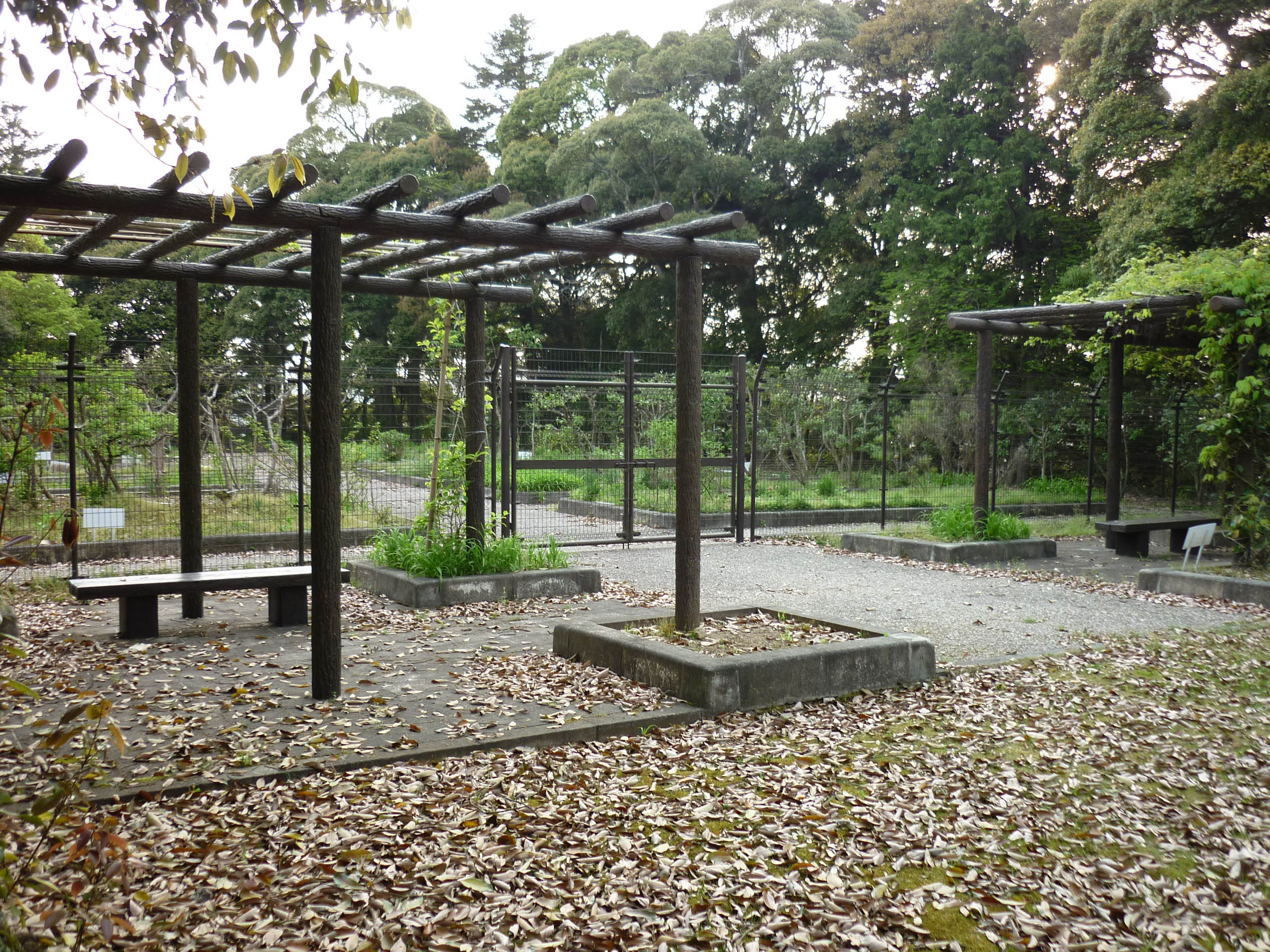 削平地